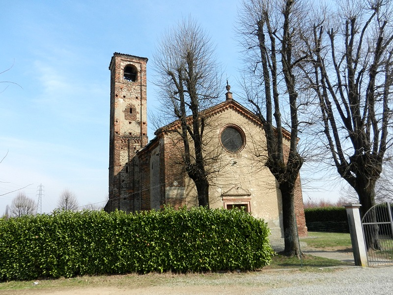 Cavenago di Brianza - Chiesa di S. Maria in Campo